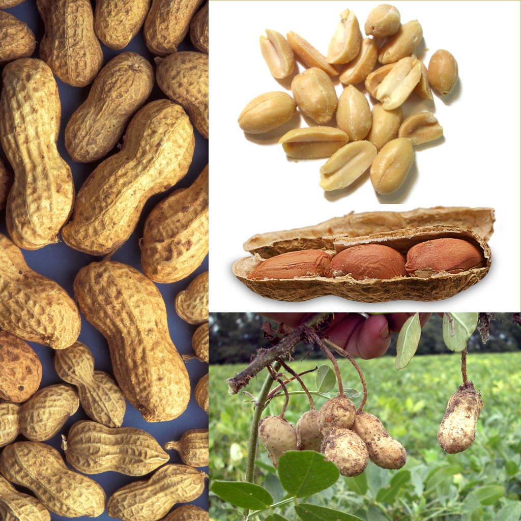 Grafika podręcznika Wikijunior:Owoce. Orzechy arachidowe, fistaszki; orzacha podziemna (Arachis hypogaea).